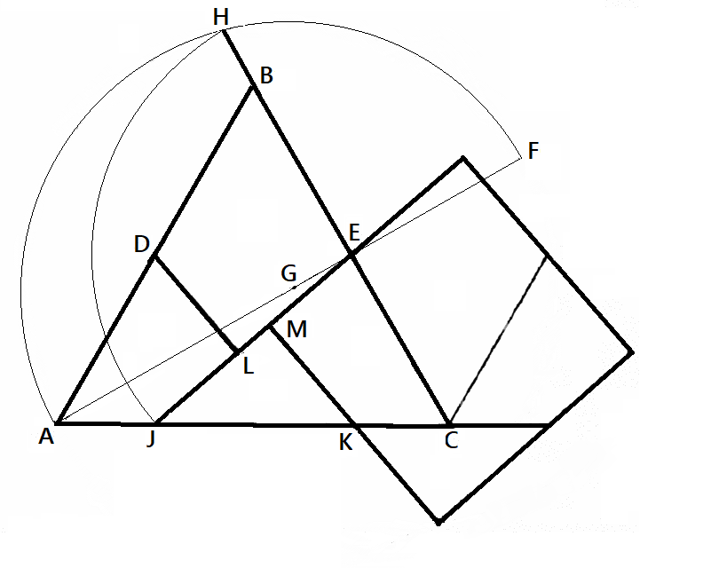 Haberdasher's Puzzle의 해답